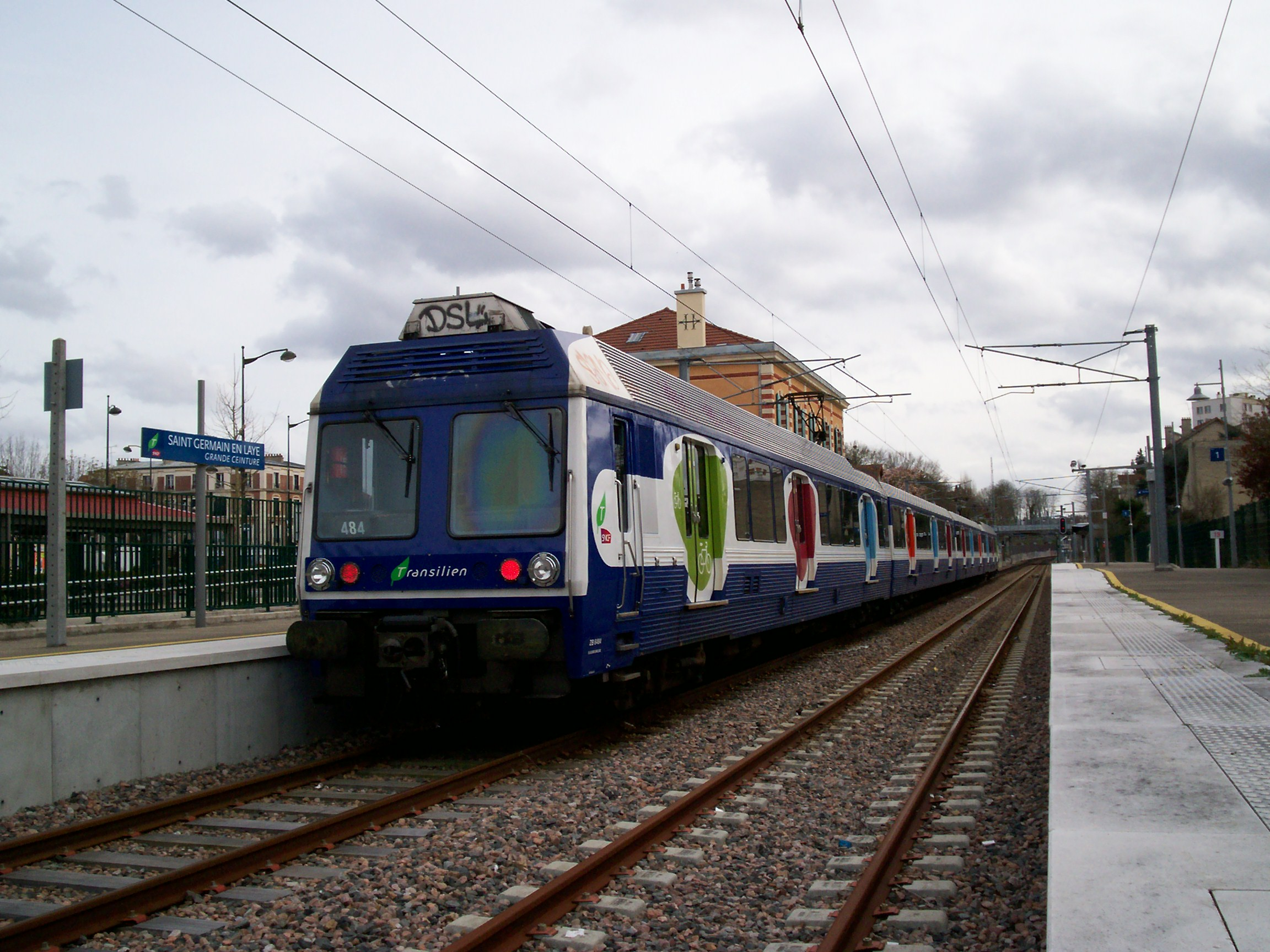 Autre vue du train GCO "NOIS" en gatr origine de Saint-Germain GC depuis le passage piétons de la gare